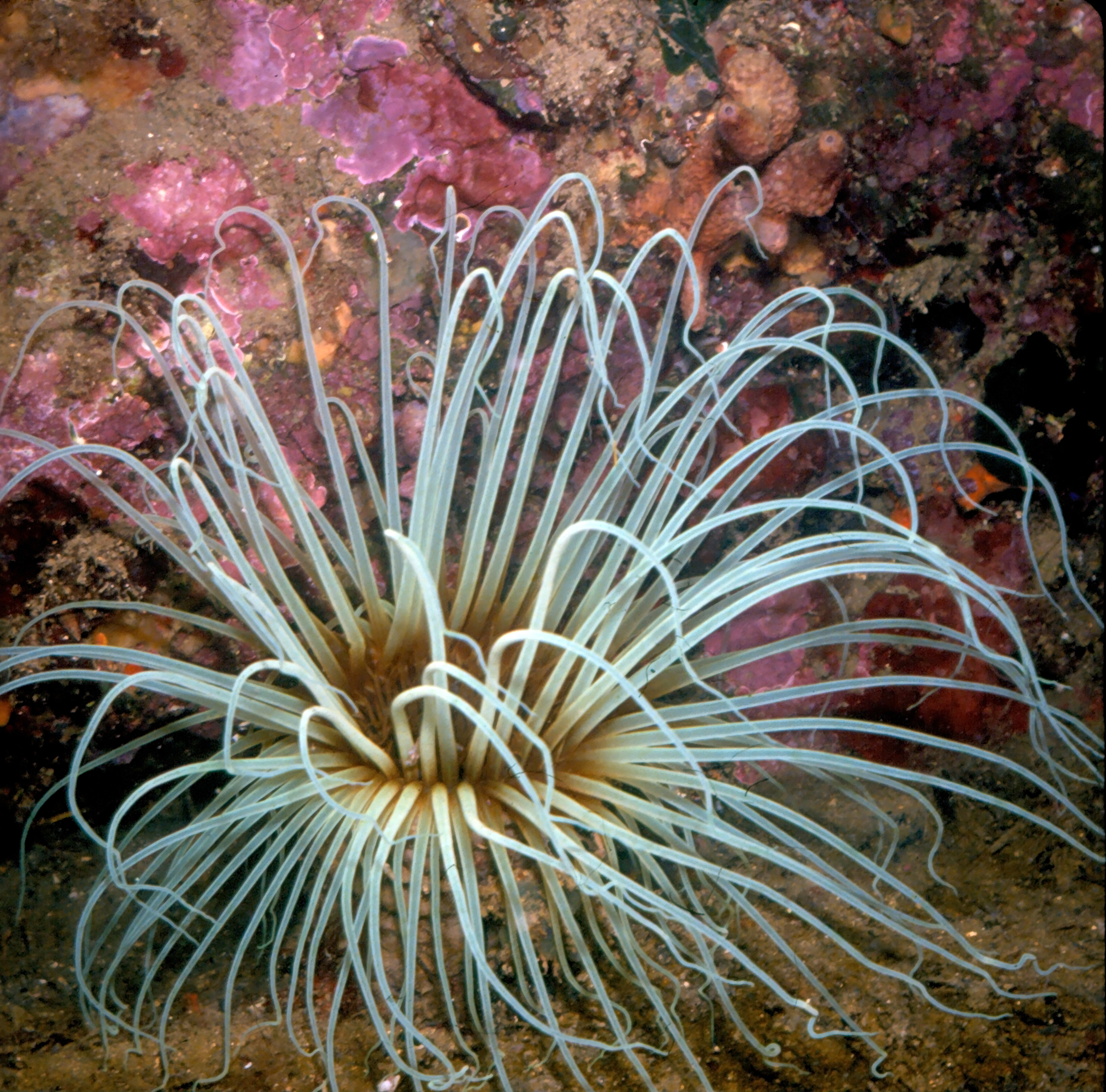 Cerianthus membranaceus Spallanzani, 1784 - Banyuls-sur-Mer : 09/81